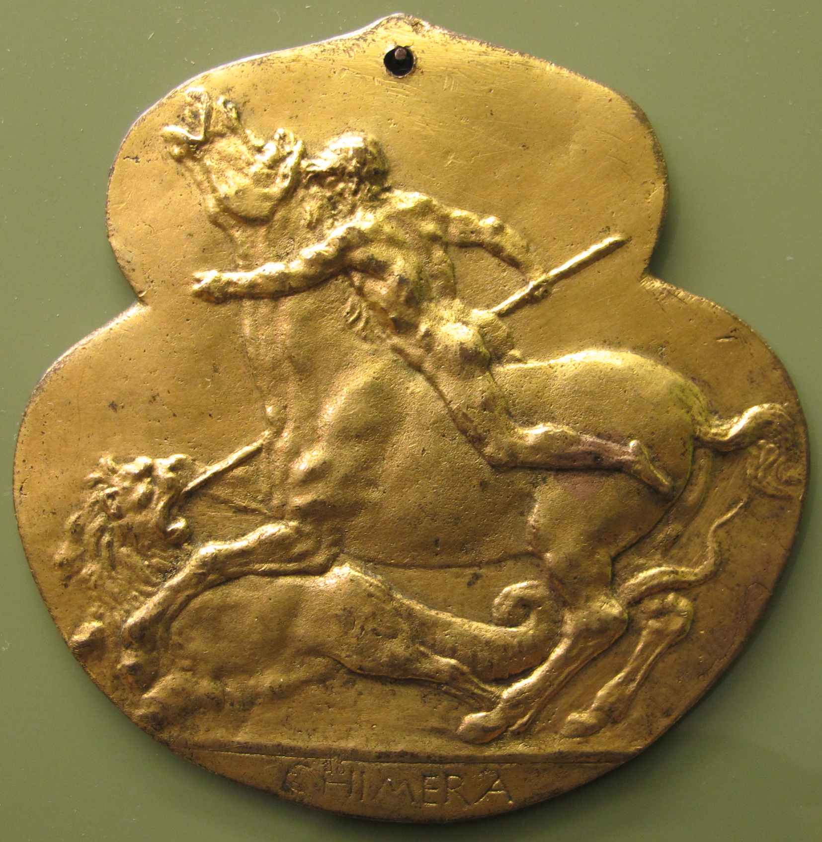 Bellerofonte uccide la chimera